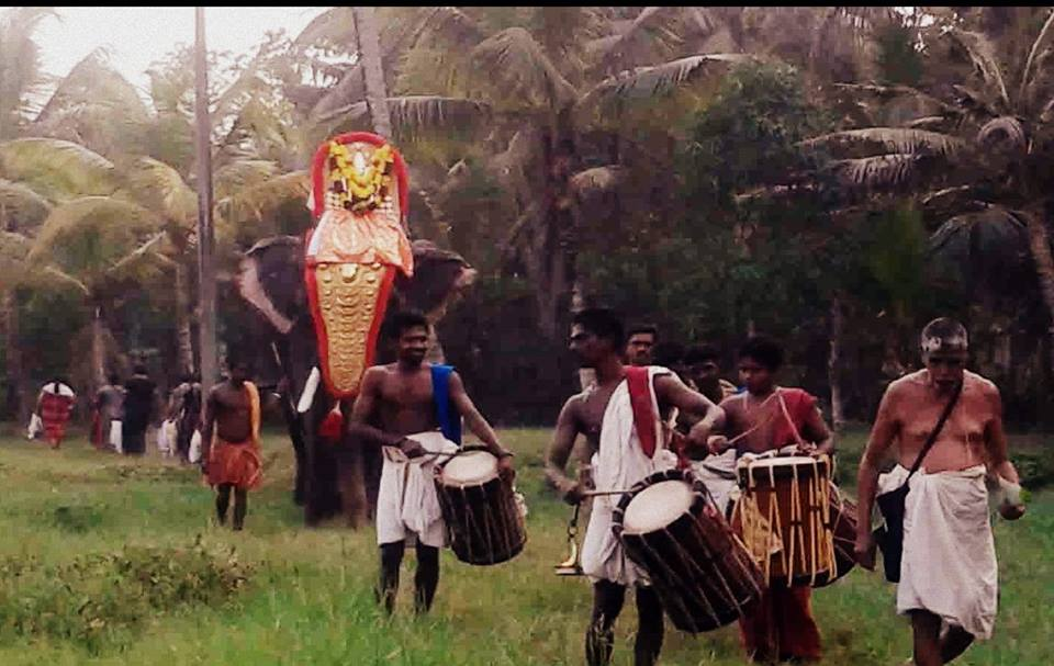 പറയെടുപ്പ്